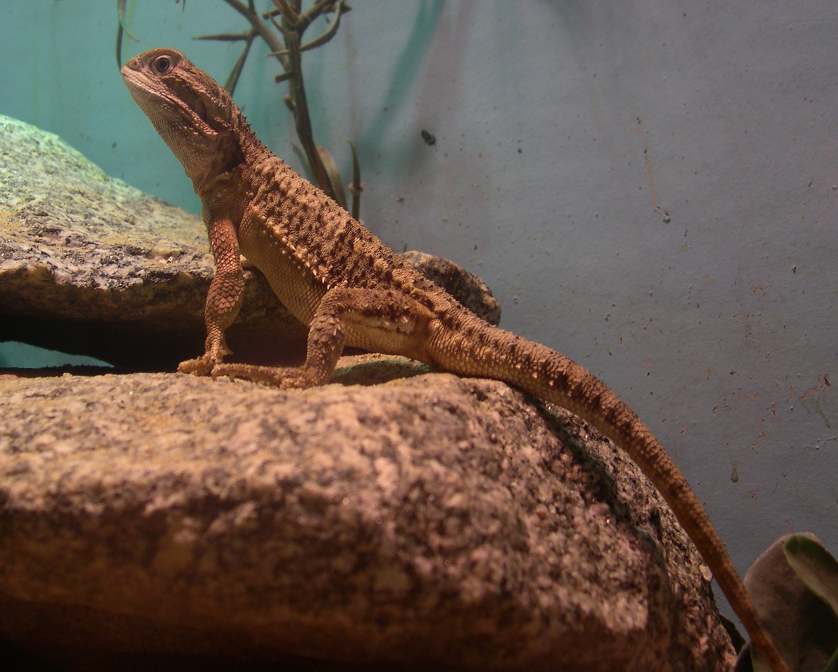 A dragon lizard (Pogona henrylawsoni) in zoo Diergaarde Blijdorp Rotterdam. Picture taken by Magalhães at 3rd of June 2006